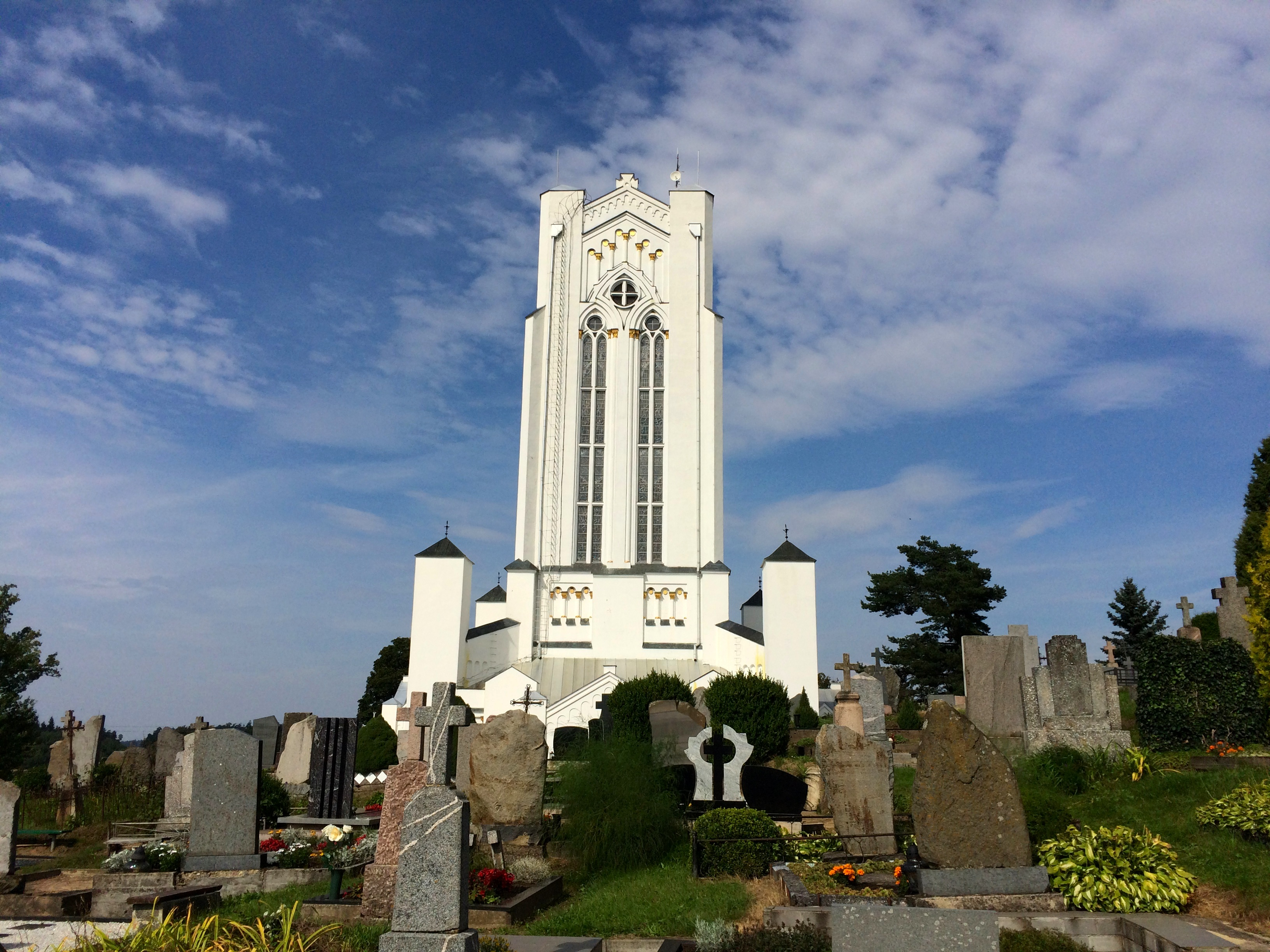 Šiluvos Švč. Mergelės Marijos Apsireiškimo koplyčia